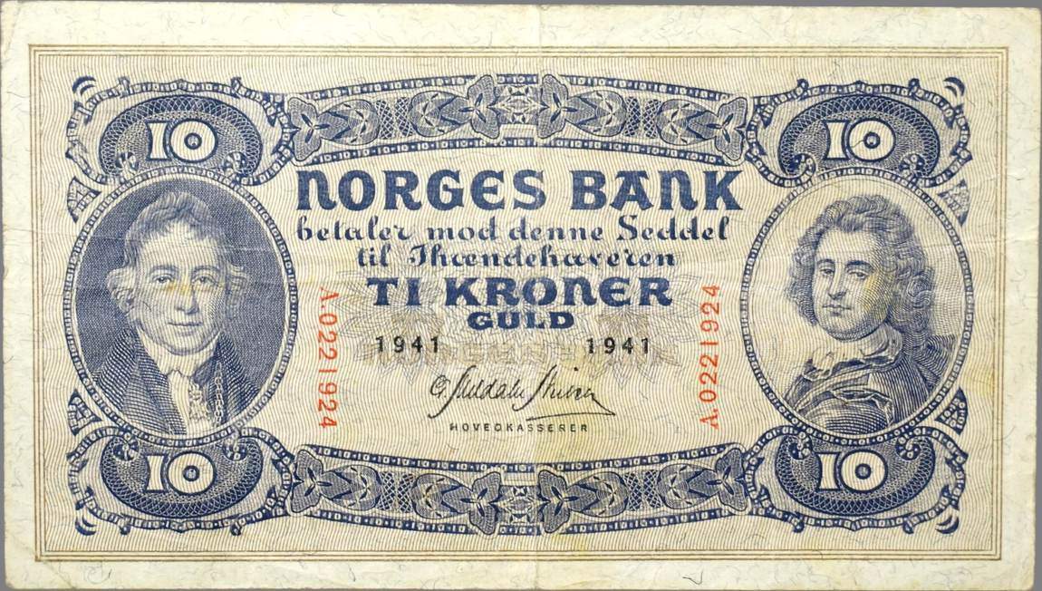 Портрет Педера Торденшельда на 10 кронах 1939 года. Норвегия.